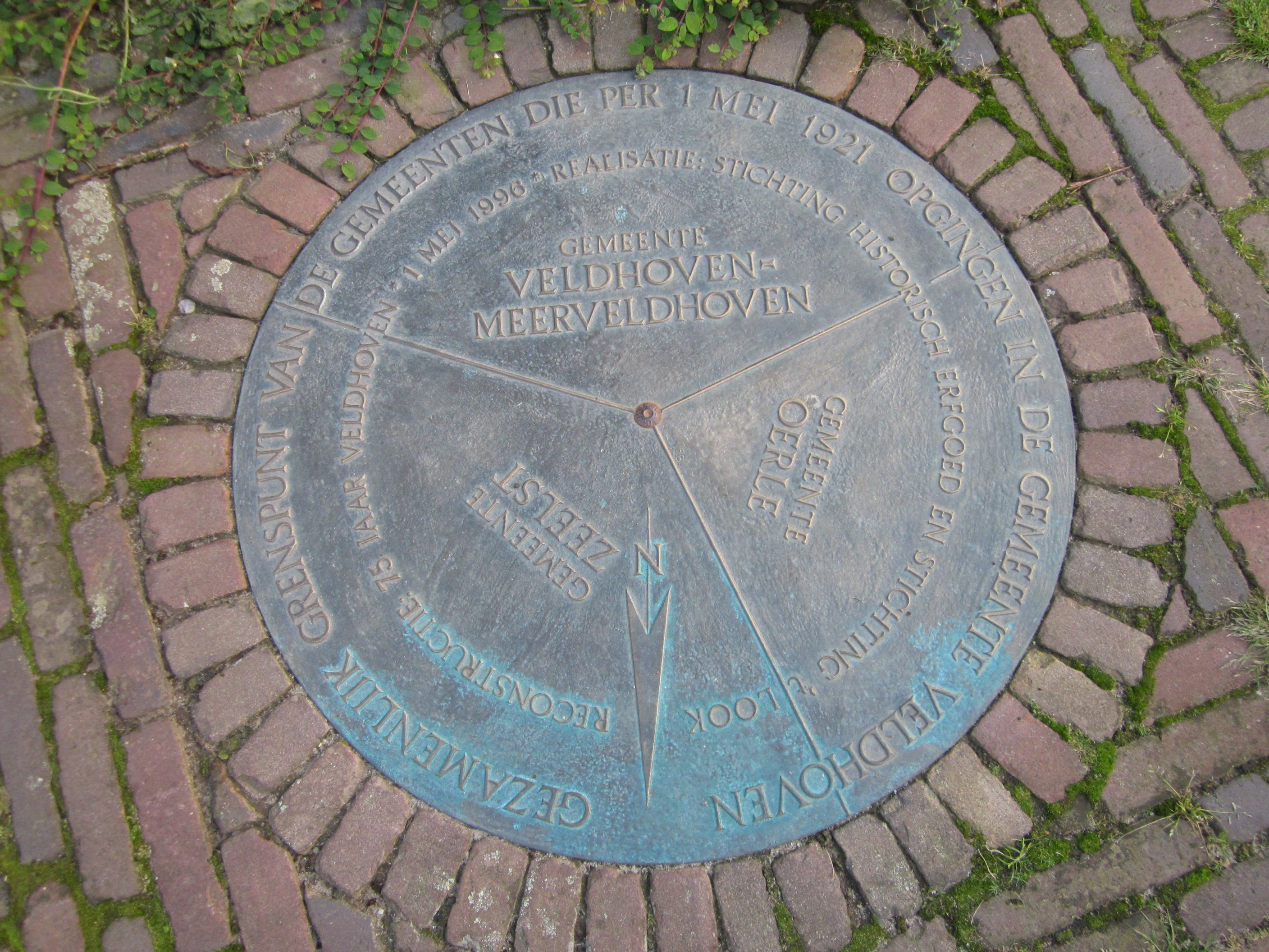 De gemeente Veldhoven is op 1 mei 1921 gevormd door het samenvoegen van de gemeenten Veldhoven en Meerveldhoven, Oerle en Zeelst. In 1996 is in het kader van 75 jaar gemeente Veldhoven een plaquette gelegd op het 'driegemeentenpunt': de geografische locatie waar de drie voormalige gemeenten aan elkaar grensden. Dit punt bevindt zich in de wijk 't Look, een wijk die in 1921 nog niet bestond. De foto toont deze plaquette.